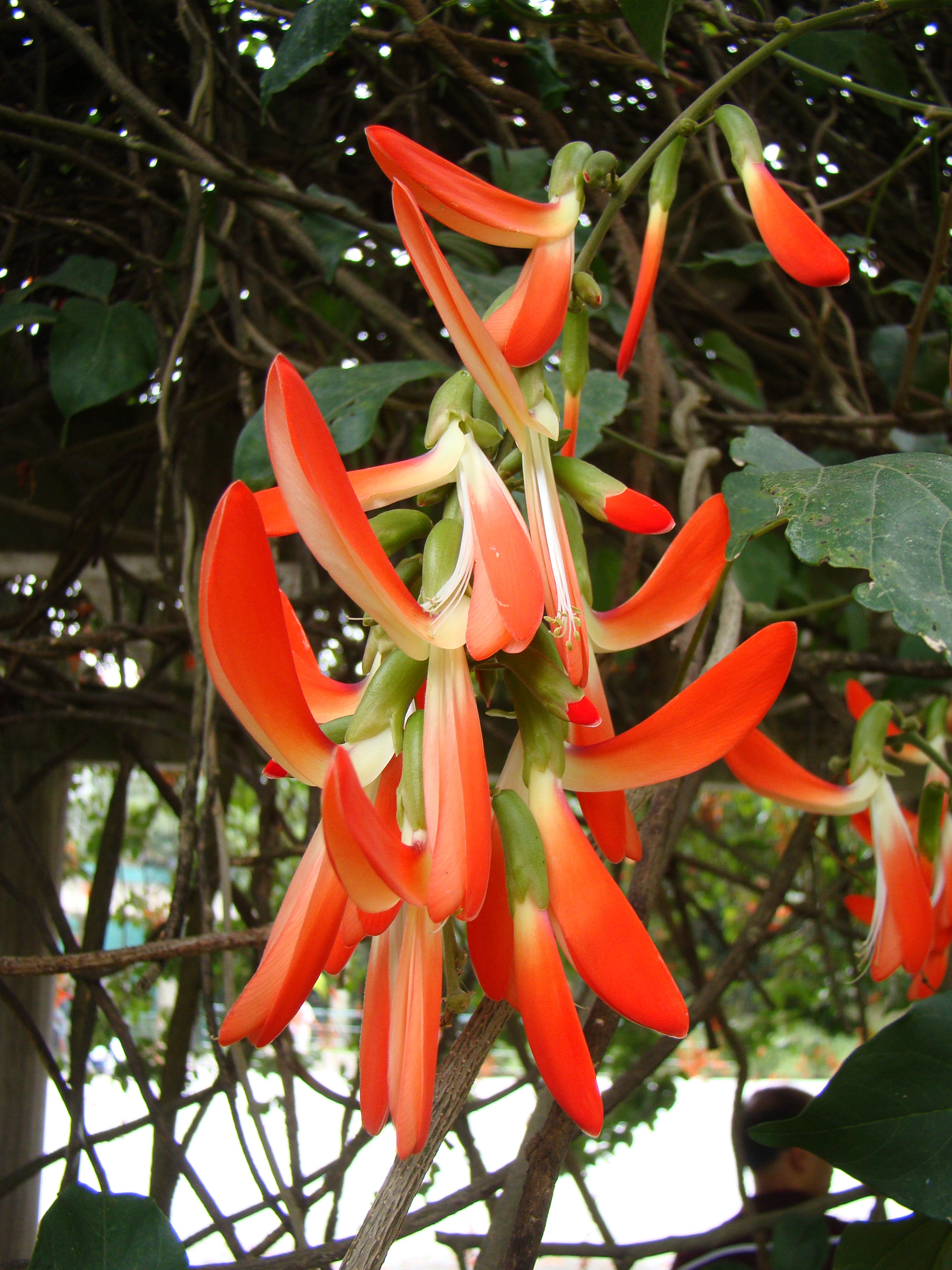 Crista-de-galo (Camptosema grandiflora), brazilian native. Sao Paulo Botanical garden